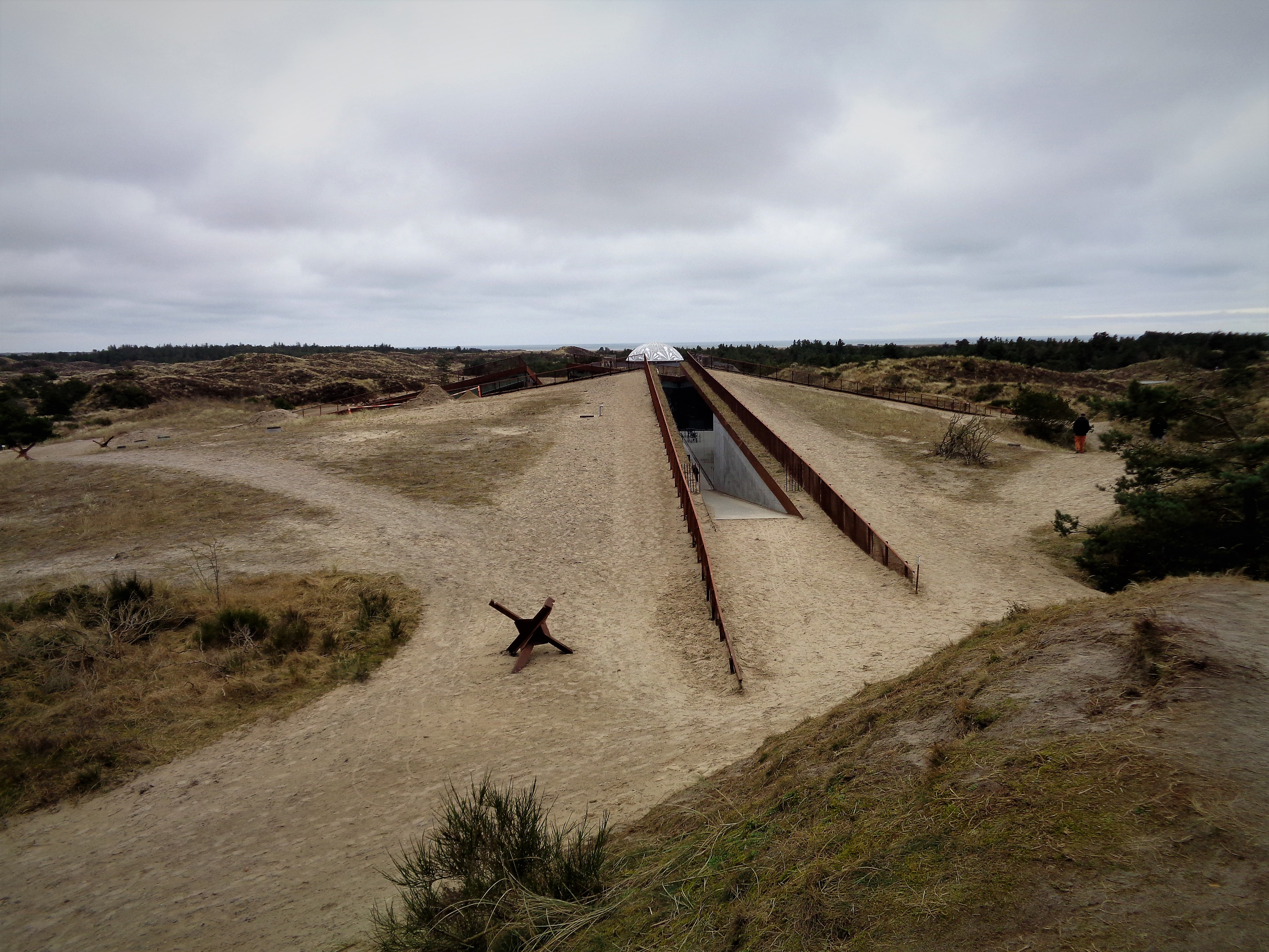 Aussenansicht des Tirpitz-Museums in Blåvand.